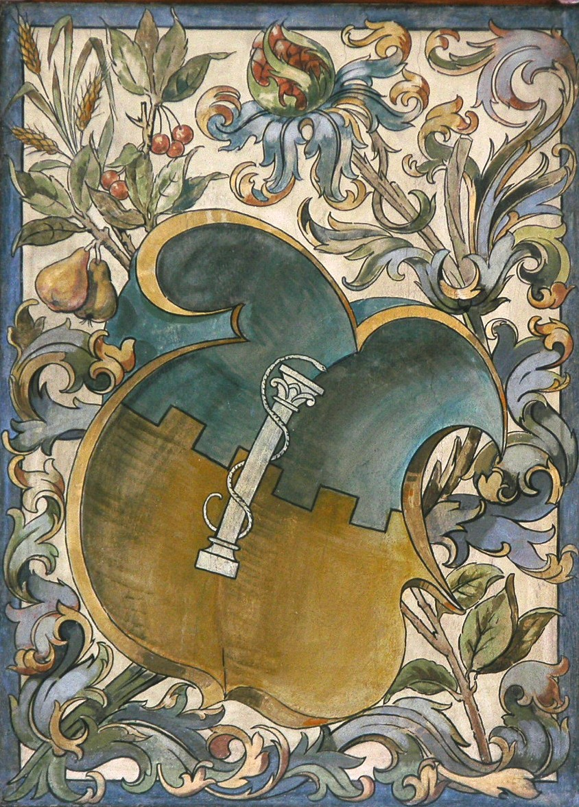 Bild am Verputz im zweiten Stock des Albert-Einstein-Hauses der Alten Kantonsschule Aarau mit dem Wappen des Freiamts